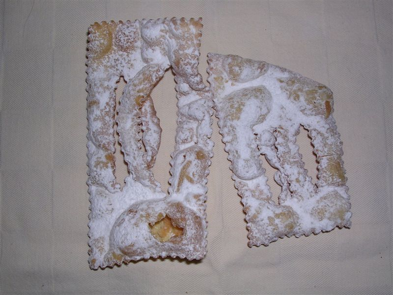 Italian carnival sweets, known as scorpelle, bugie, cenci, chiacchiere, cròstoli, galani, lasagne, lattughe, pampuglie, rosoni sfrappole or frappe. Own photo.